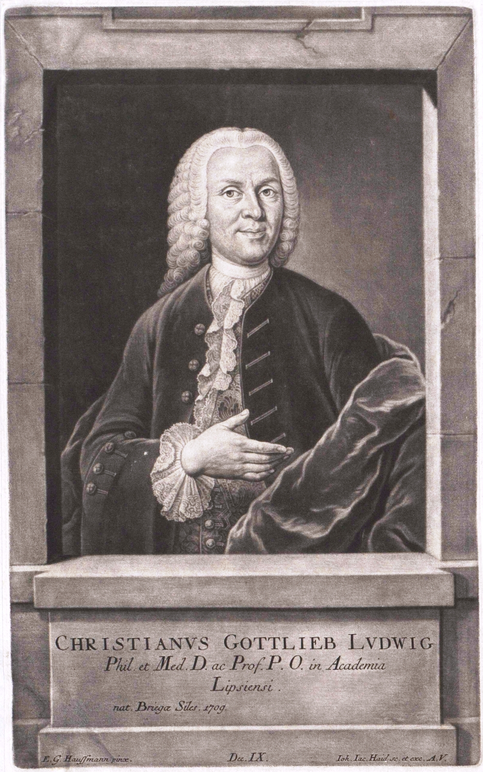 Christian Gottlieb Ludwig (1709–1773), Stich von J.J.Haid nach E.G.Hausmann